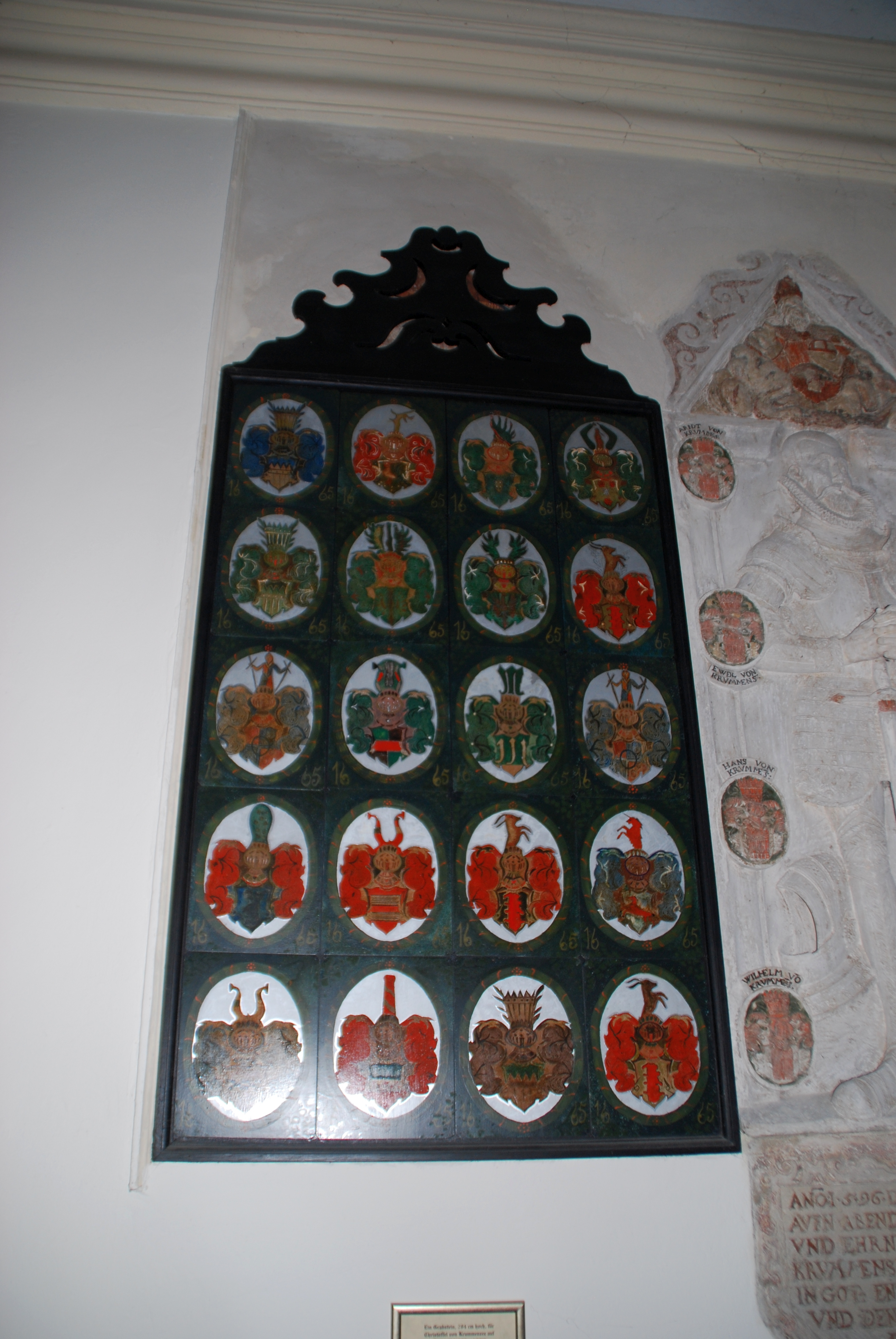 Ahnentafel von Heinrich Wilhelm von Krummensee aus dem Jahr 1665 in der Schlosskirche Schöneiche: 20 auf Blech gemalte Wappen (Kopie)